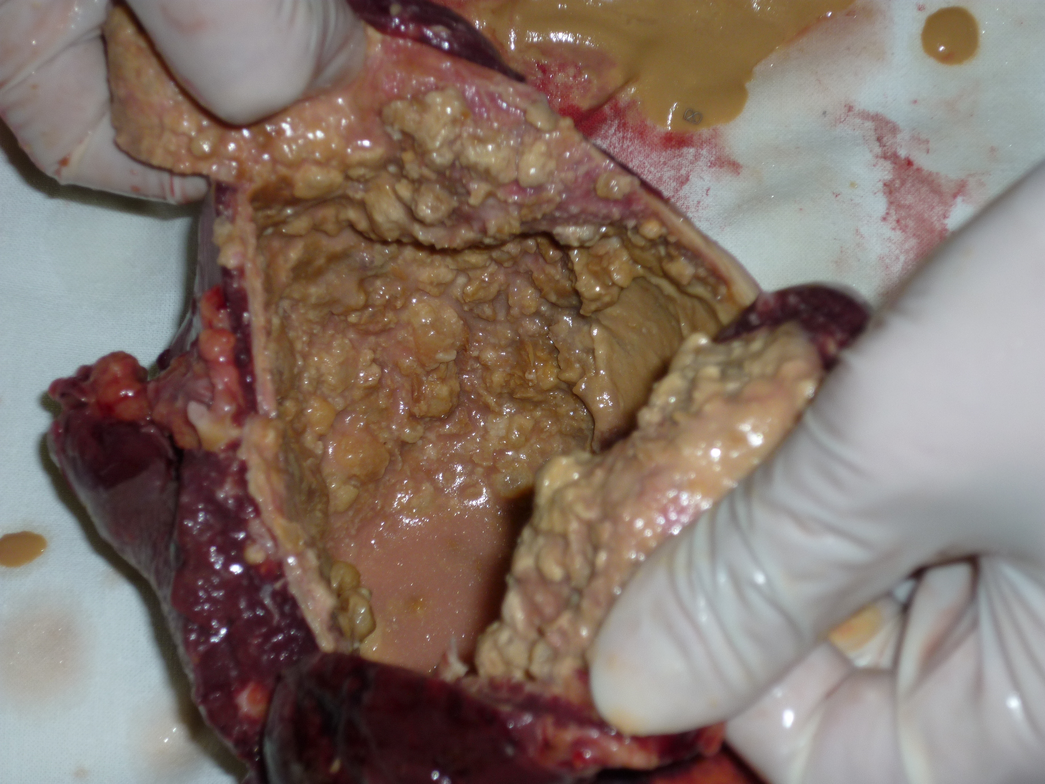 Селезенка после спленэктомии. После разреза препарата выявляется полость, содержащая гнойный экссудат